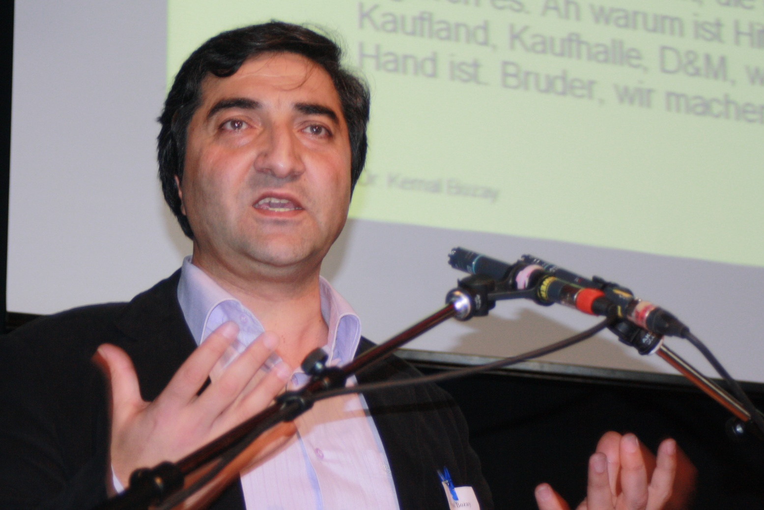 Kemal Bozay, deutscher Politik-, Erziehungs- und Sozialwissenschaftler. Hier während der Fachtagung "Heimatliebe, Nationalstrolz und Rassismus - Einzelmeinungen oder Trend?" der Fachinformationsstelle gegen Rechtsextremismus in München (firm). Titel des Werks: "Kemal Bozay (2010)"